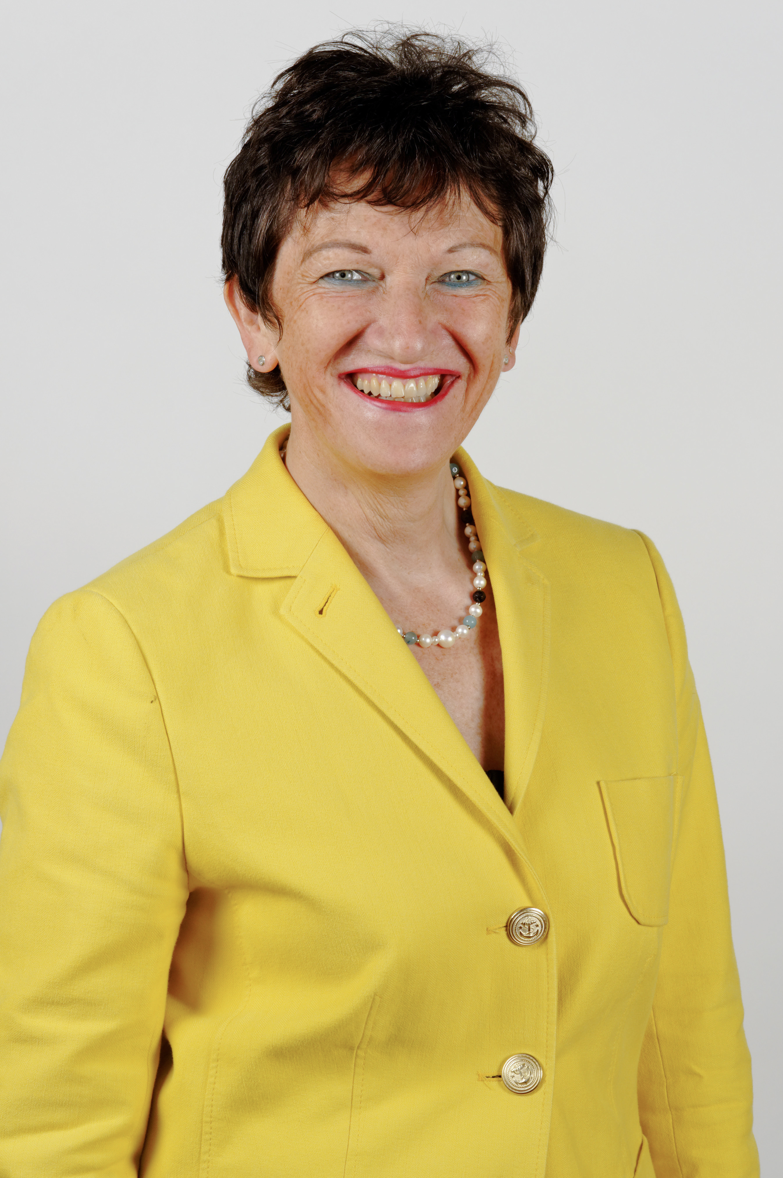 Landtagsprojekt Bayern